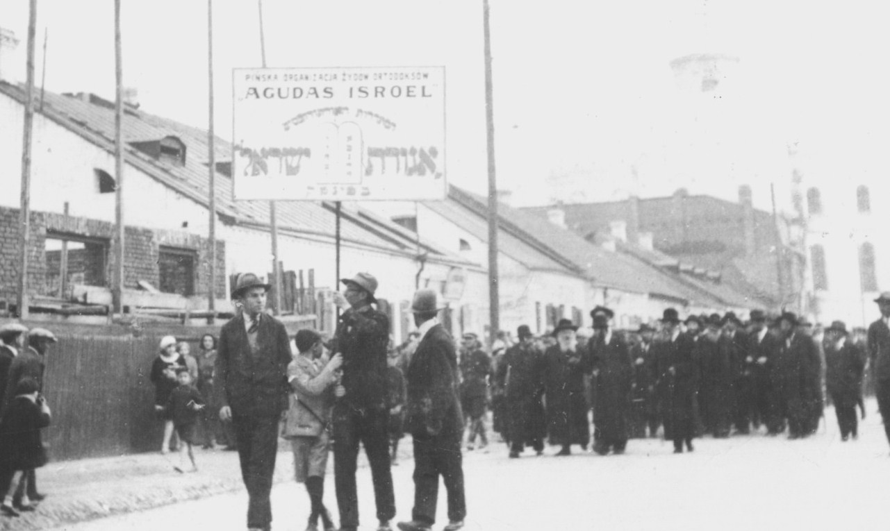 צעדת אגודת ישראל בעיר פינסק, בראש הצועדים הרב וואלקין